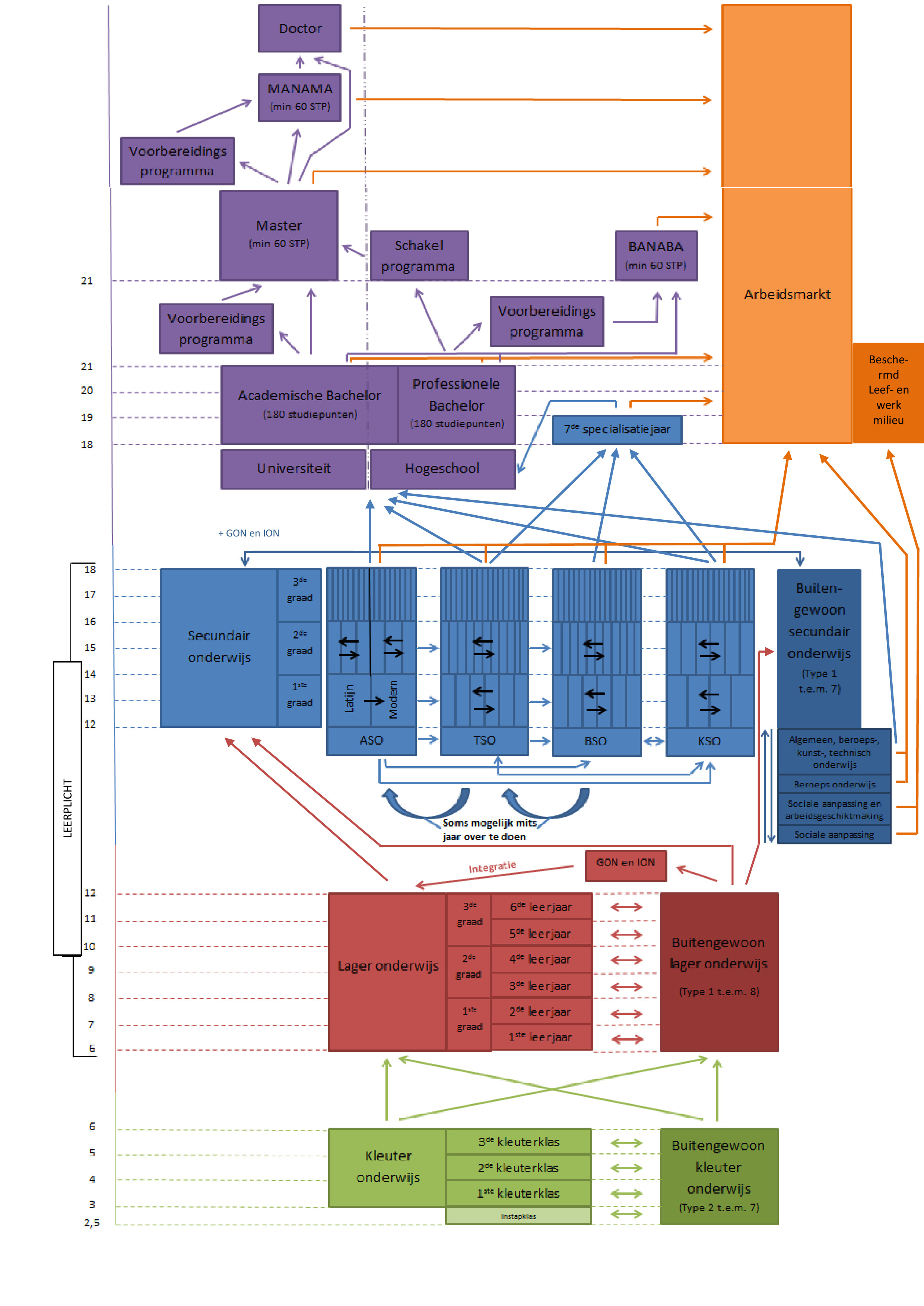 Structuur Onderwijssysteem in Vlaanderen (België)